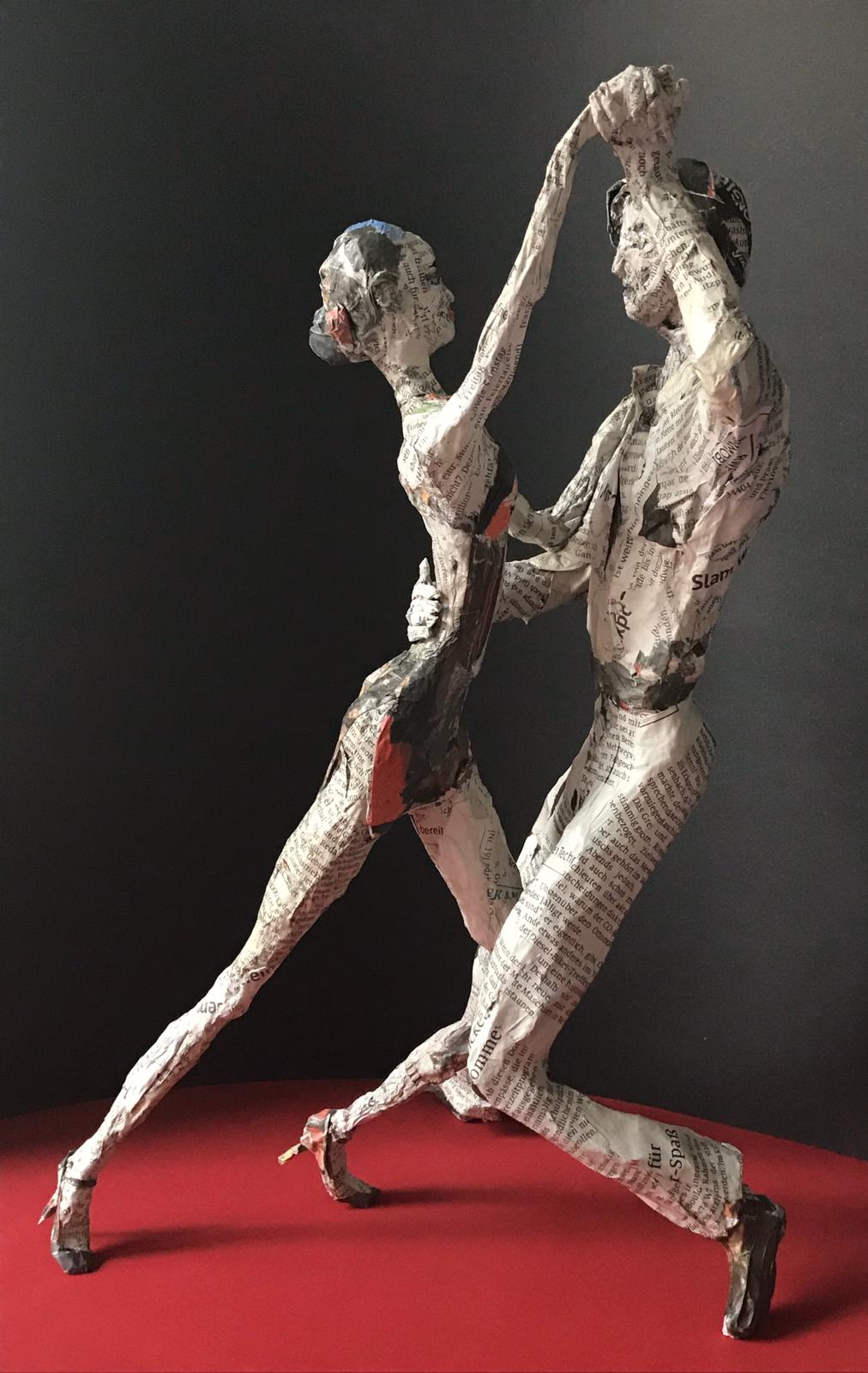 Pappmaché Figur von Christiane Altzweig:"Tango!"